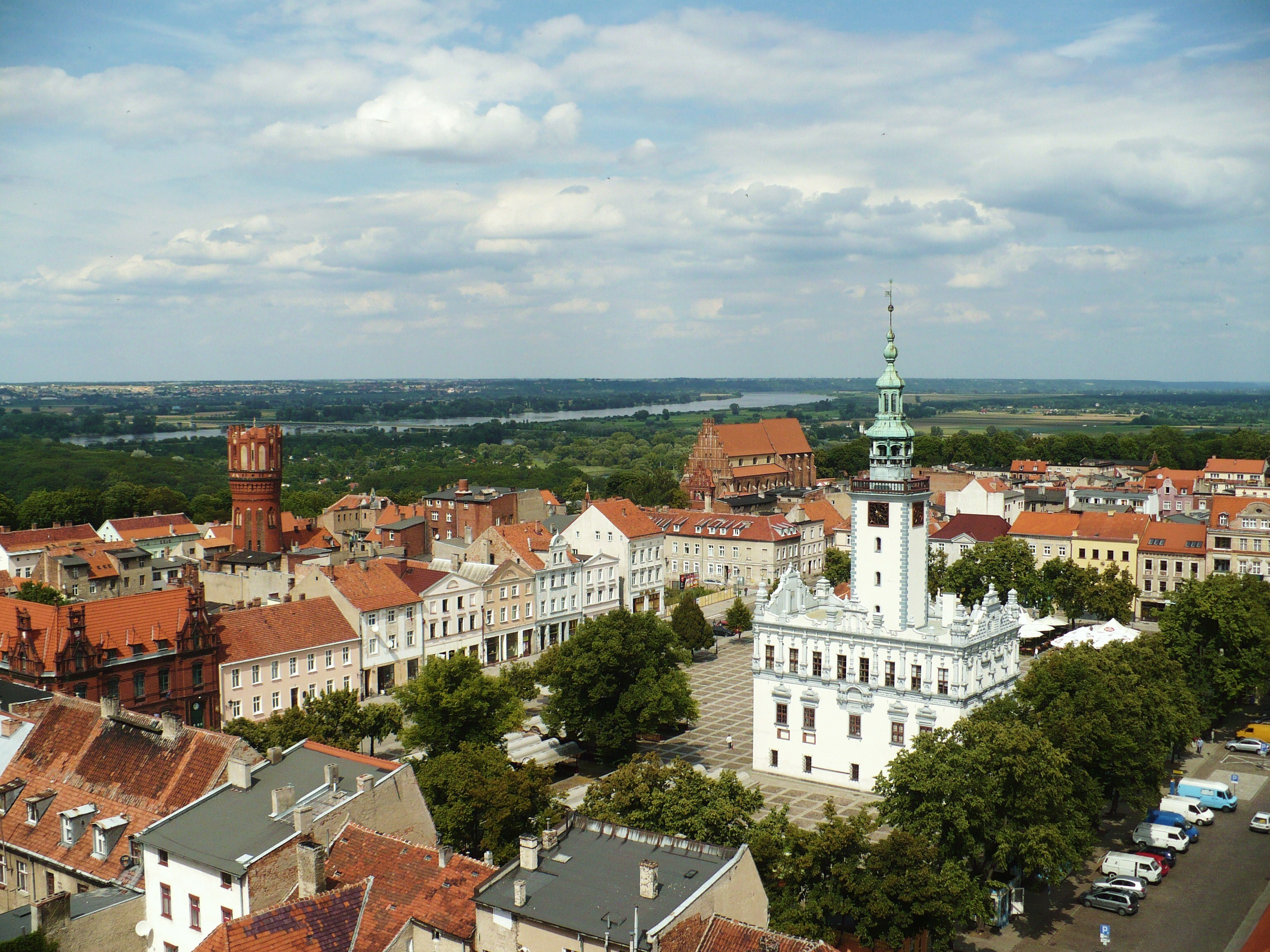 Widok z wieży chełmińskiej fary na chełmiński Rynek i ratusz,w głębi kościół podominikański